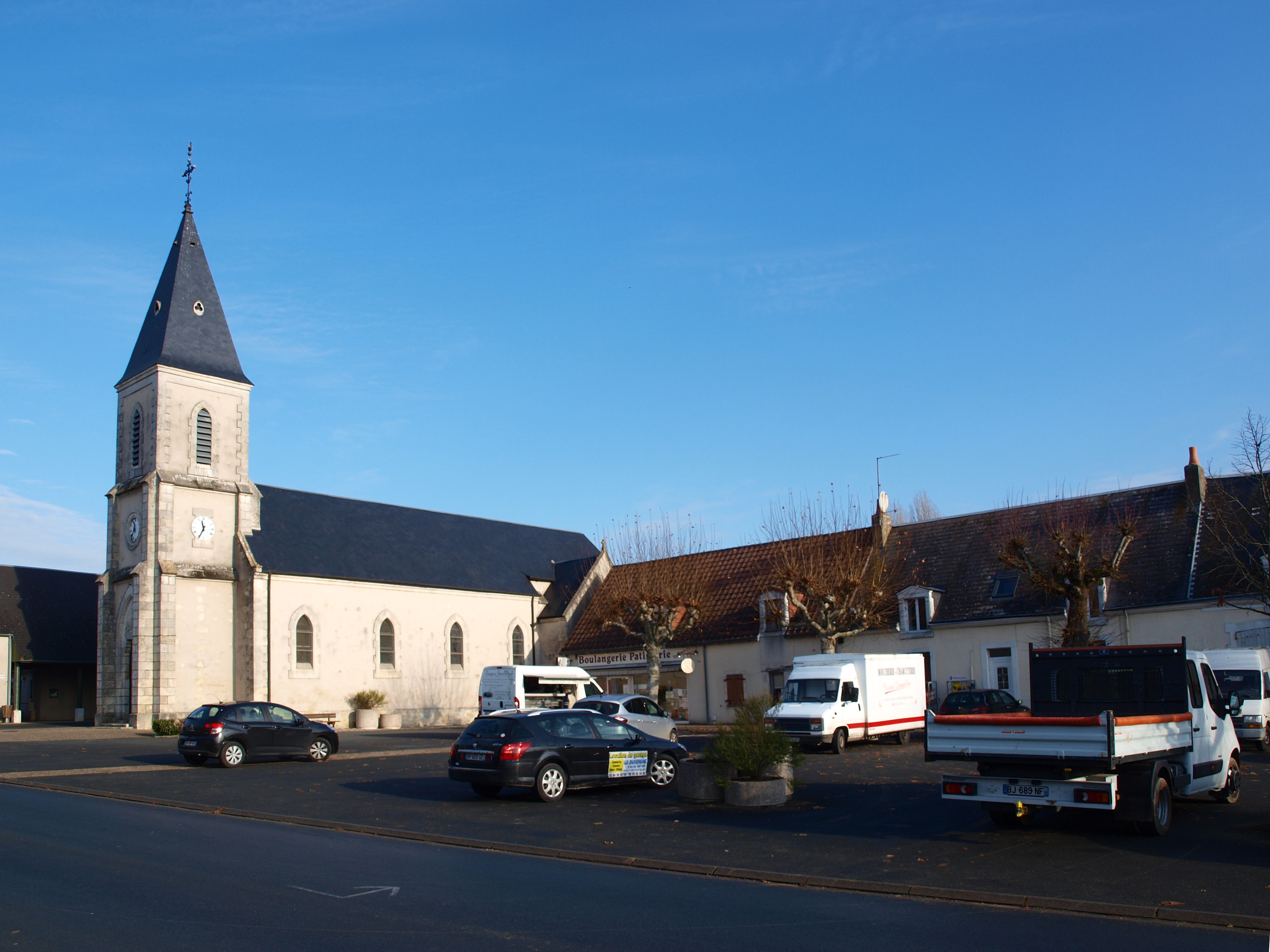 Luant (Indre, France) ; l'église